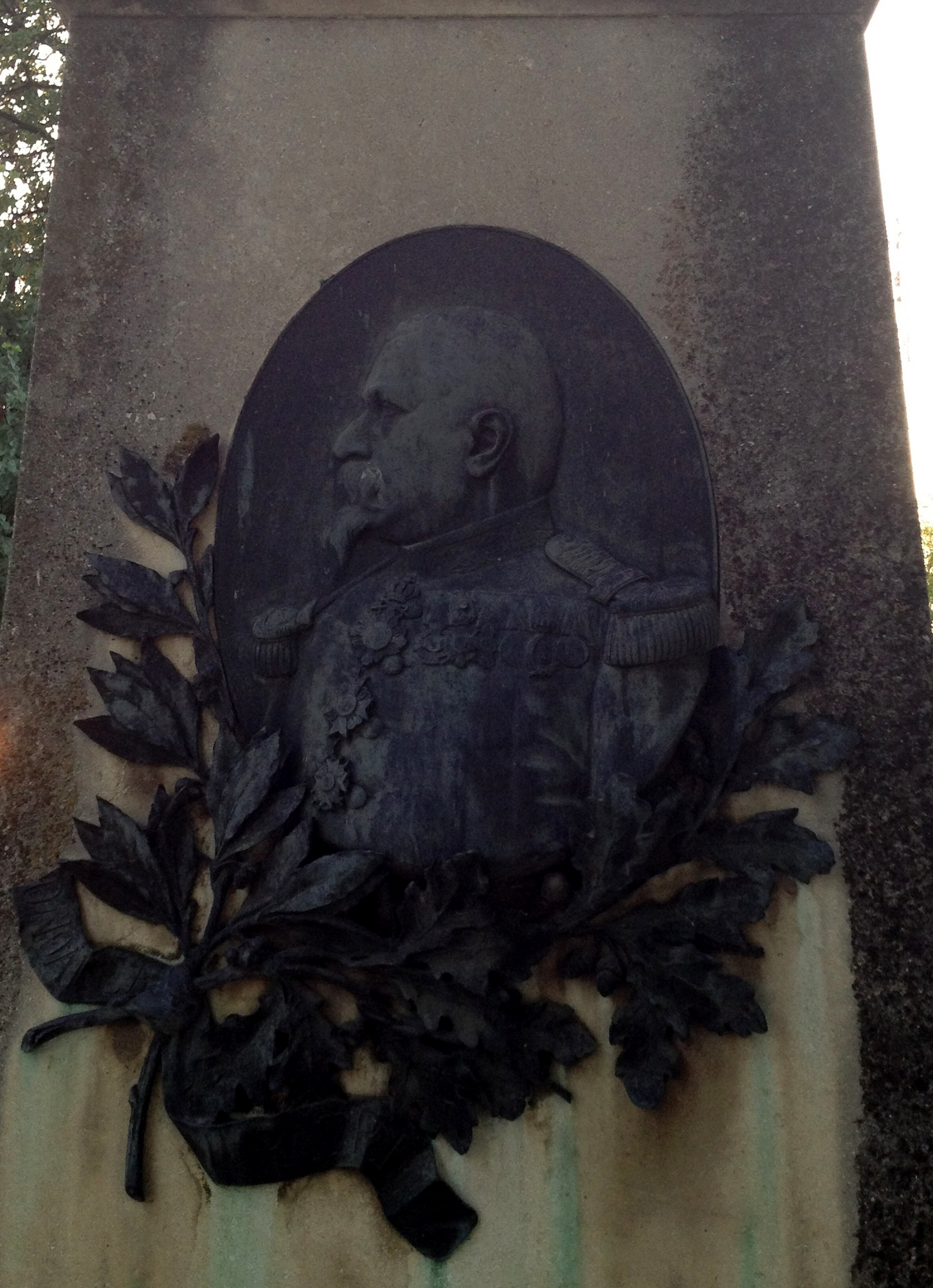 Basorelief Zamfir I. Gheorghiu